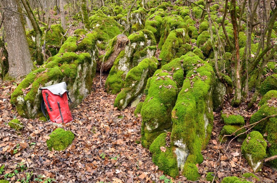 Stráňové, hlboko rozčlenené škrapové pole v JZ svahu Jasovskej planiny predstavuje výstupky horninového masívu waxeneckých (tisovských) vápencov na relatívne veľkej ploche v úpätných partiách planiny. Vzhľadom na priaznivé mikroklimatické pomery v stráňových ryhách býva pokryté pestrými spoločenstvami machov a lišajníkov.